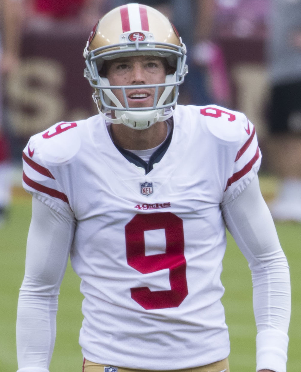 49ers at Redskins 10/15/17